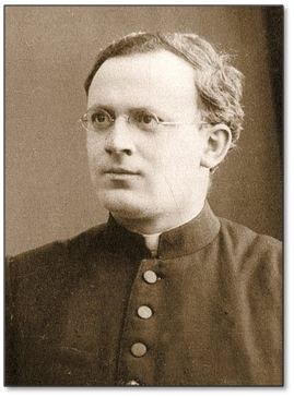 Photo: Der deutsche Dogmatiker, Theologe, Philosoph und Historiker Martin Grabmann